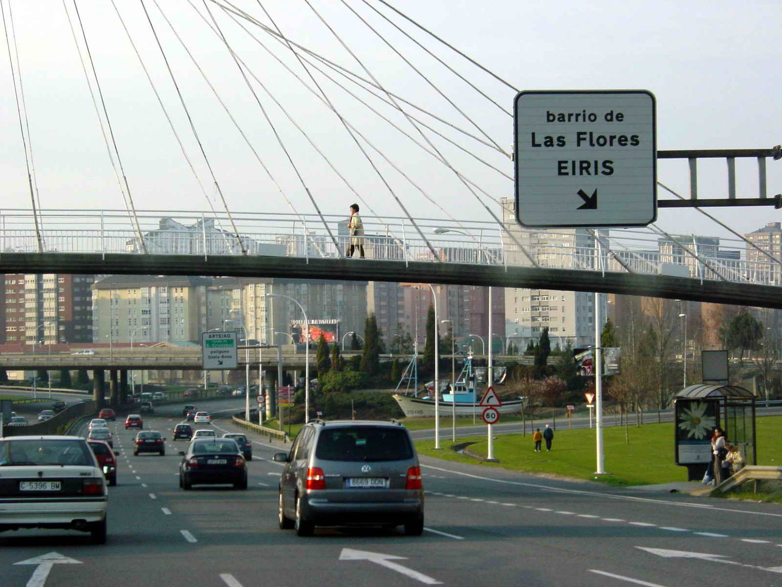 A Coruña - Galicia - Spain